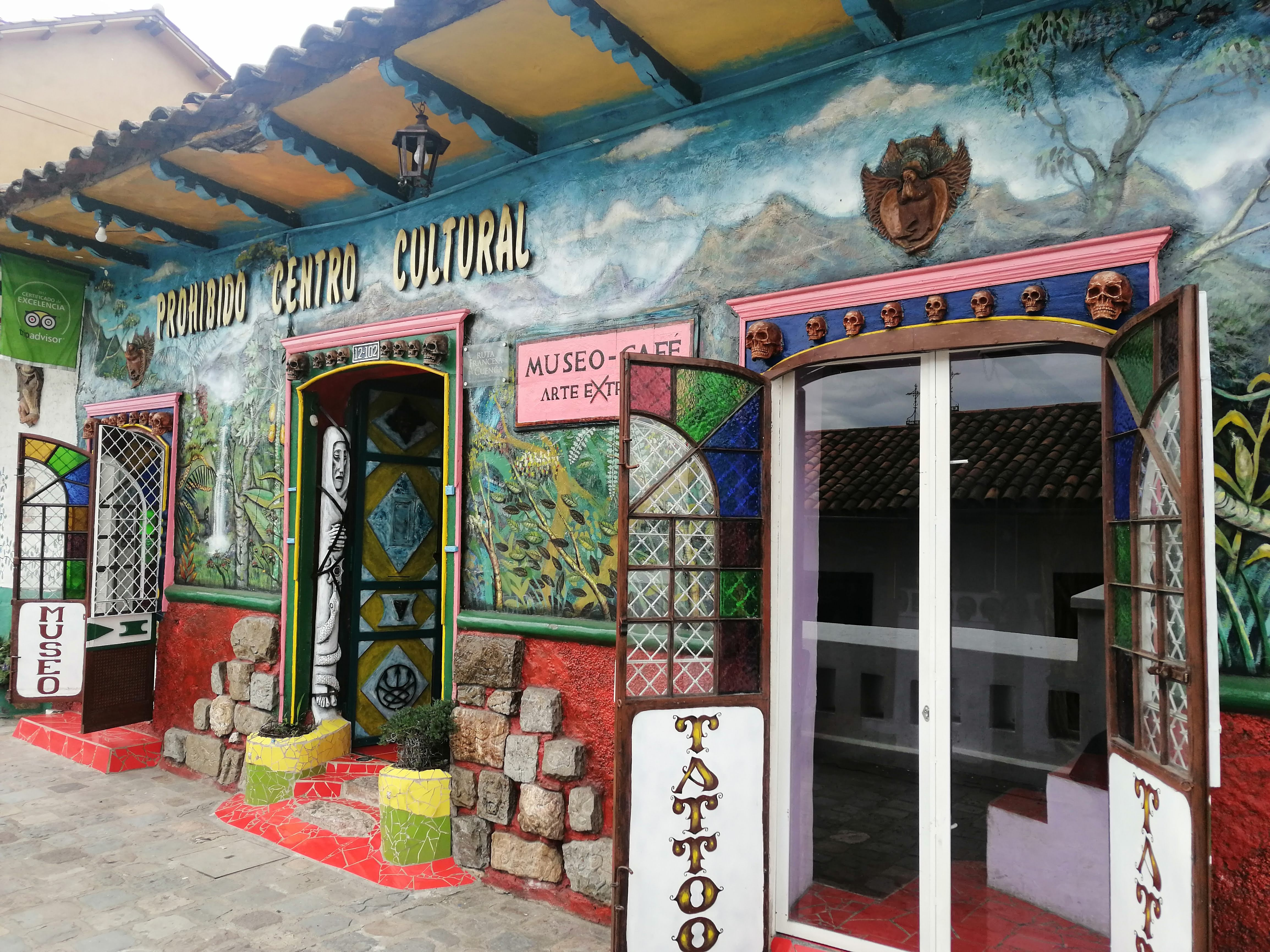 Representación general del museo